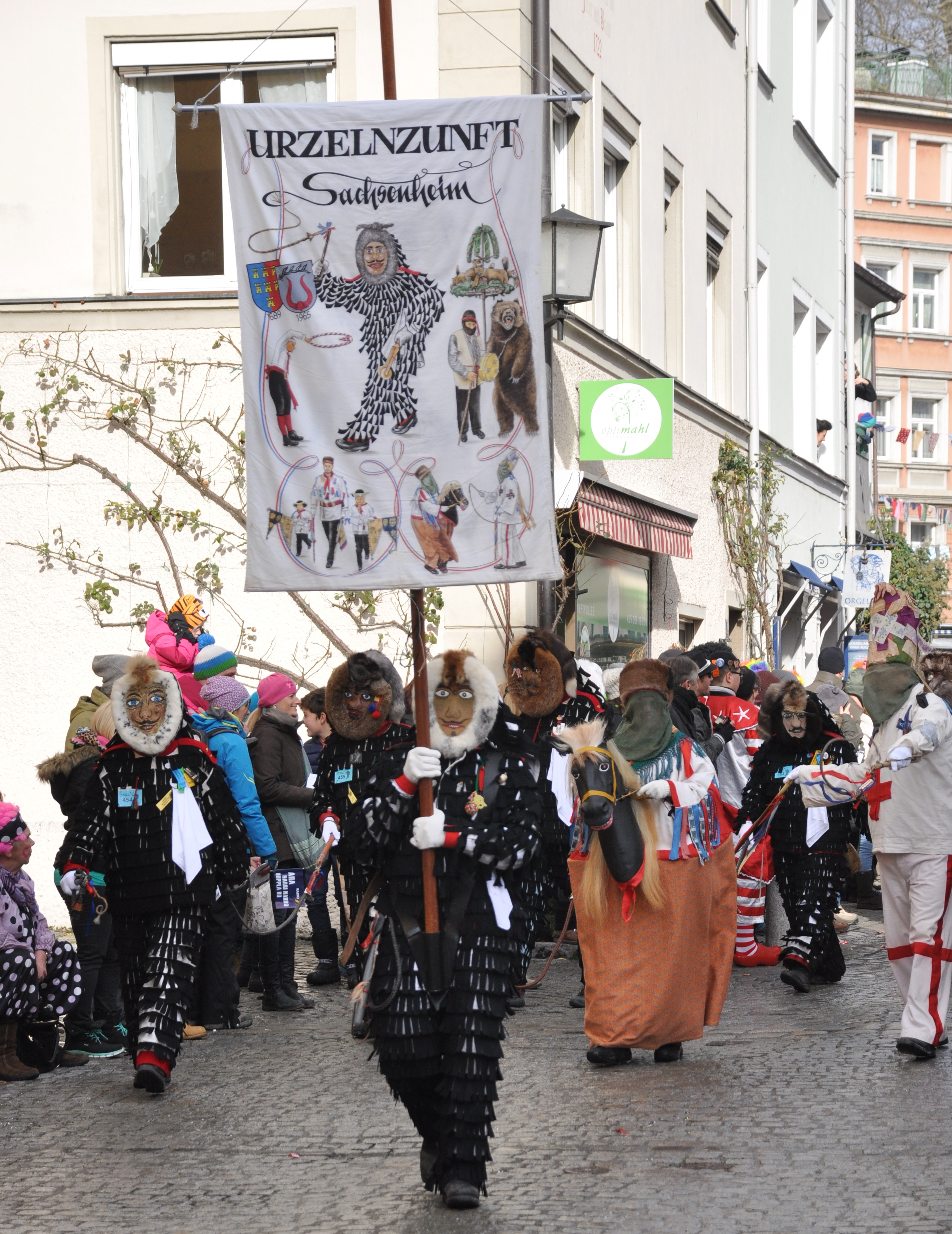 Urzelnzunft Sachsenheim (Landkreis Ludwigsburg), Narrenfigur: Urzel Fotografiert beim Großen Narrentreffen der Vereinigung Schwäbisch-Alemannischer Narrenzünfte (VSAN) in Lindau; Narrensprung am Sonntag, 24. Januar 2016.